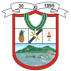 escudo del peñon